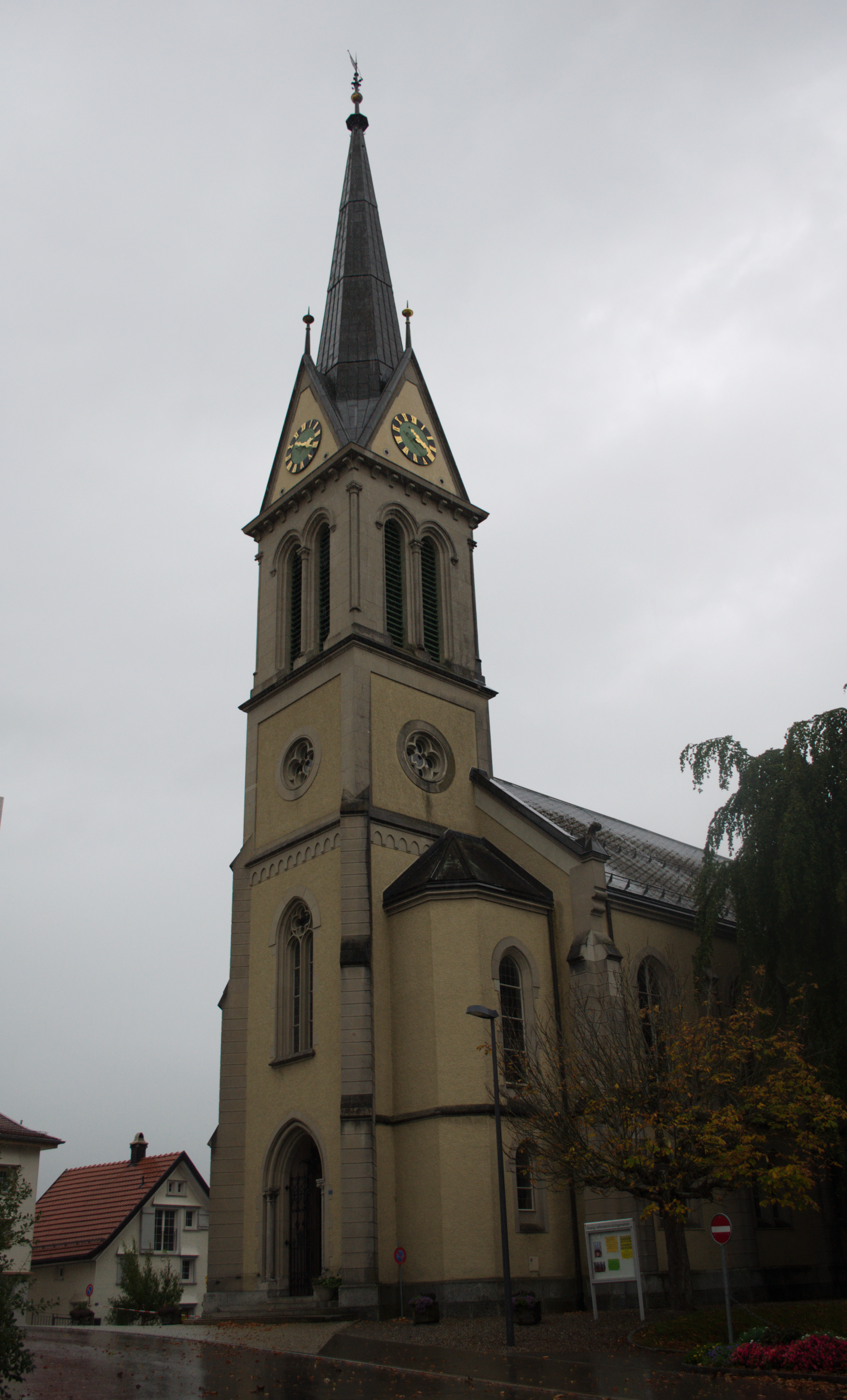 Reformierte Kirche Rehetobel